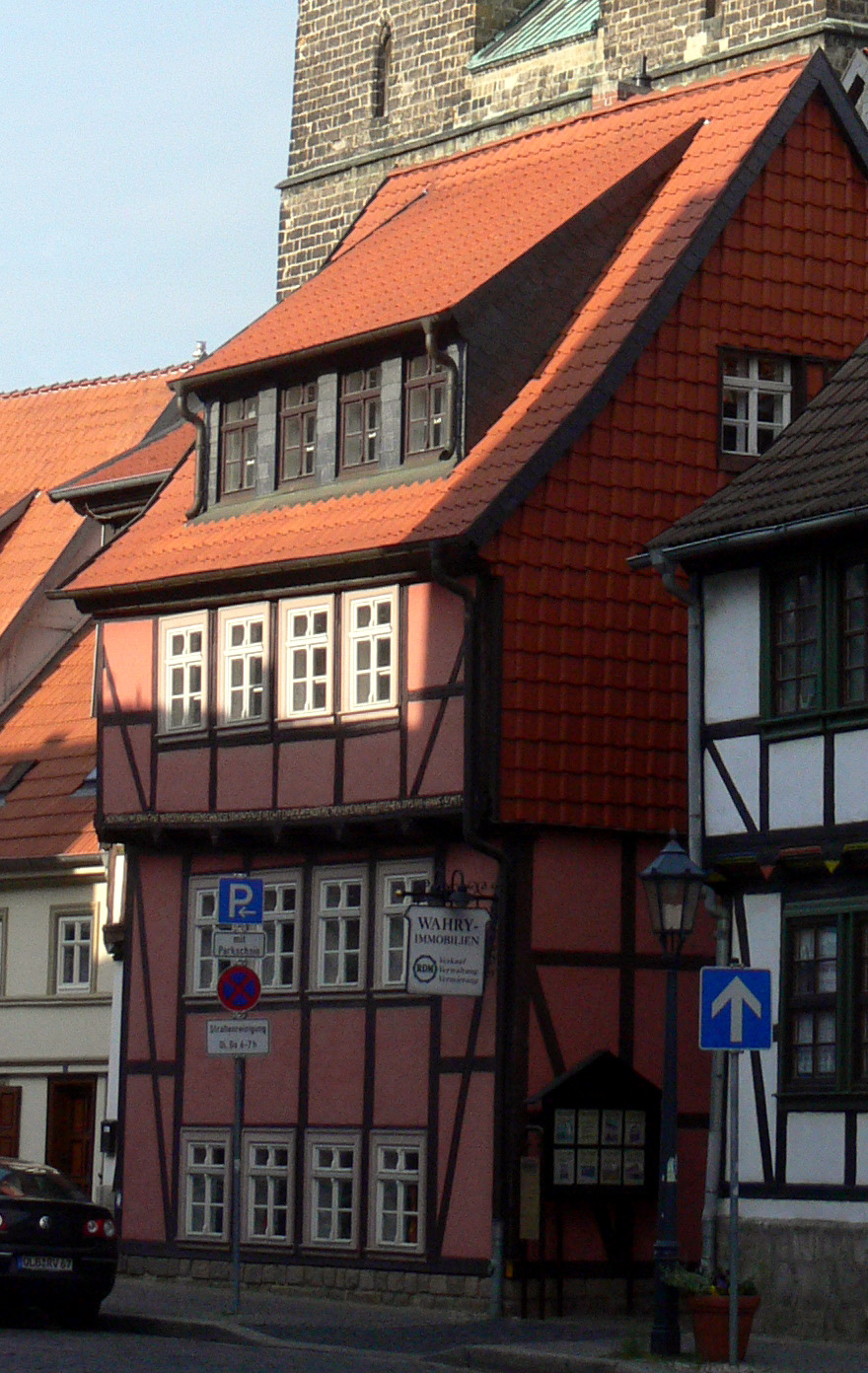 Türme der Nikolaikirche